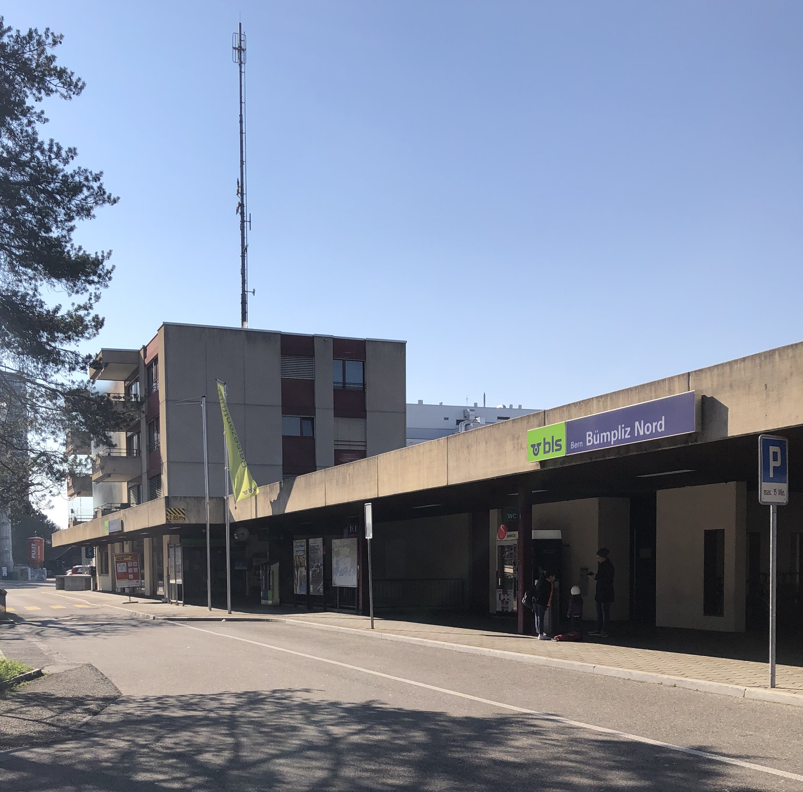 Bahnhof Bümpliz Nord von Fellegut her gesehen